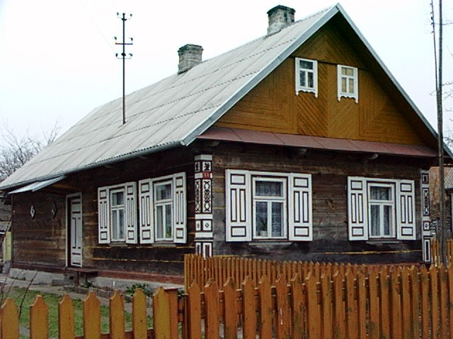 wieś Kotówka 13